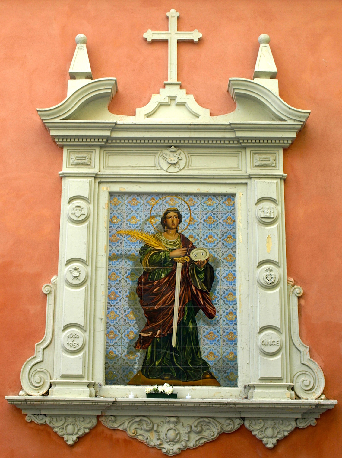 Azulejo de Santa Lucía. Antonio Kiernam Flores, 1955. Iglesia de Santa Catalina. Sevilla, Andalucía, España.